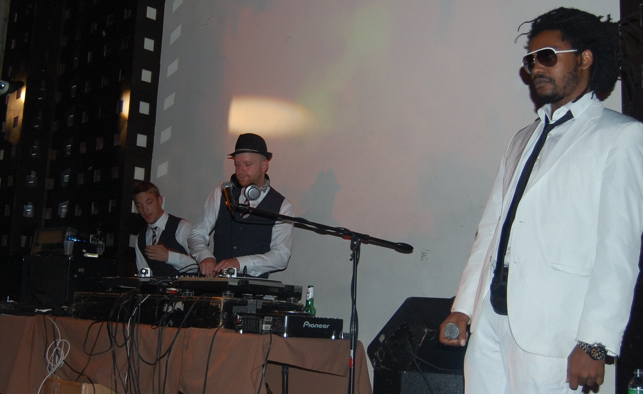 June 12, 2009 Nikon D40